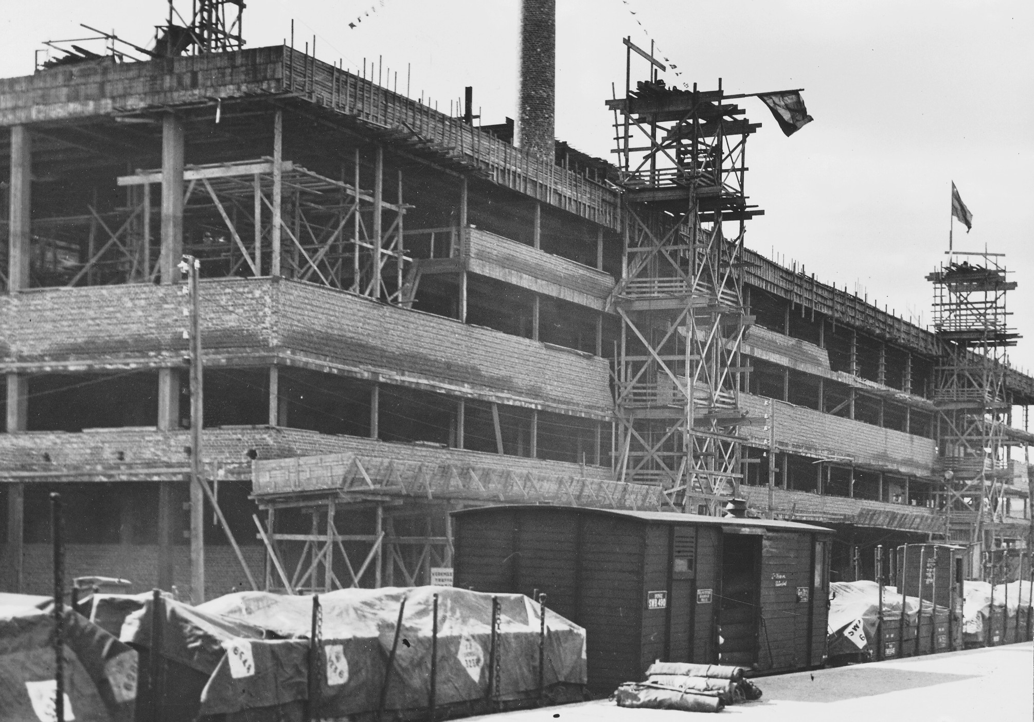 KF:s Centrallager på Södermalm, takslagsfest